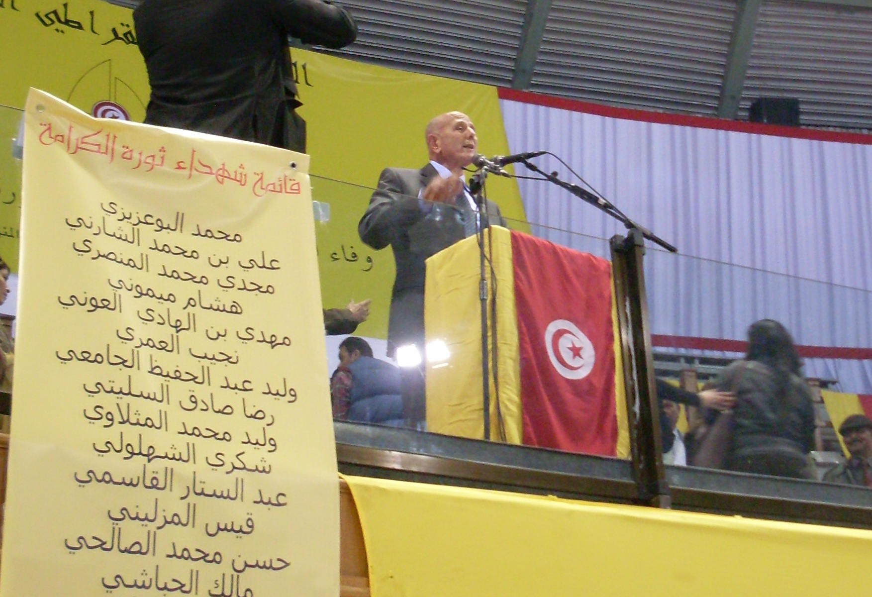 Ahmed Najib Chebbi dans un meeting du Parti démocrate progressiste à Tunis